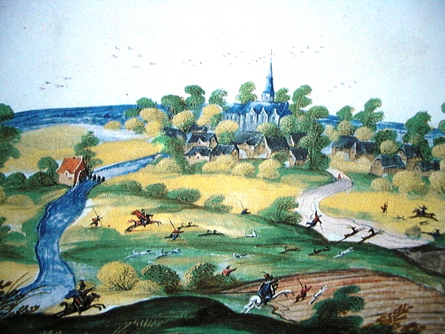 Wasquehal dans l'album de Croy de 1603.